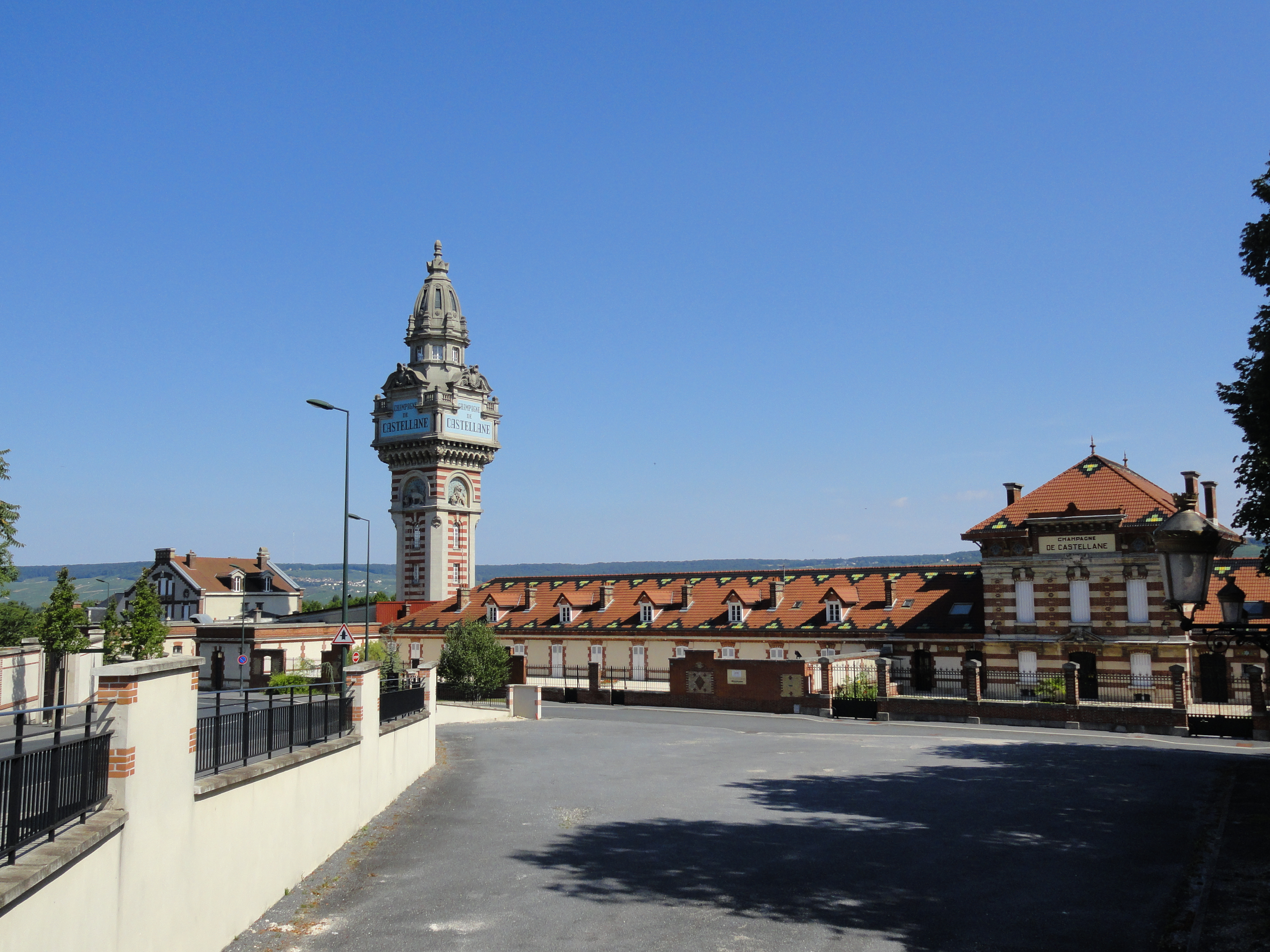 Maison de Champagne De Castellane à Épernay